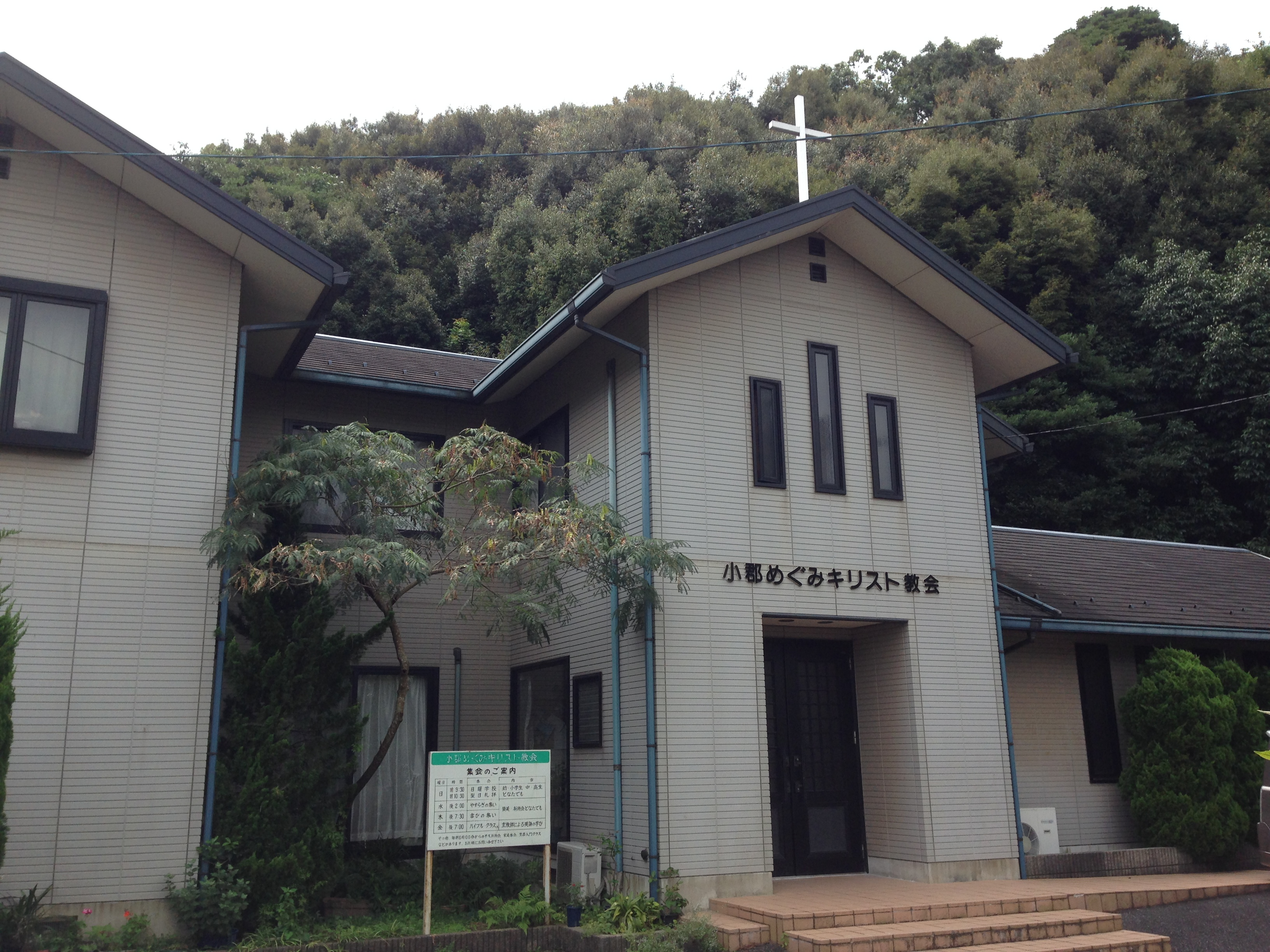 小郡めぐみキリスト教会